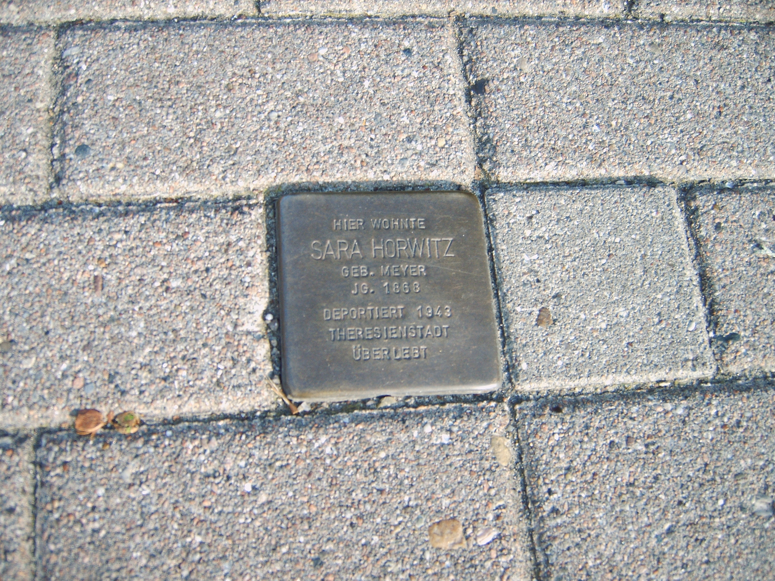 Stolperstein Sara Horwitz, wohnte in Winsen (Luhe) zwischen Bahnhofstraße und Rathausstraße (östliche Straßenseite). Haus abgerissen, heute Straßenverlauf Von-Somnitz-Ring.